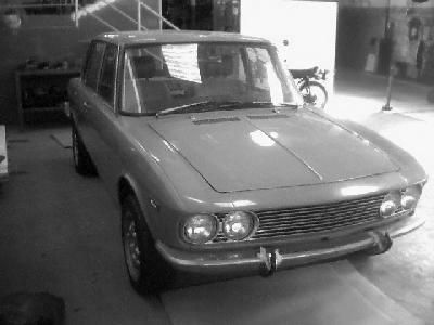 o meu mazda 1500